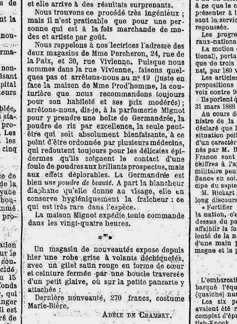 Le Monde et la Mode, article de presse (Avril 1880)